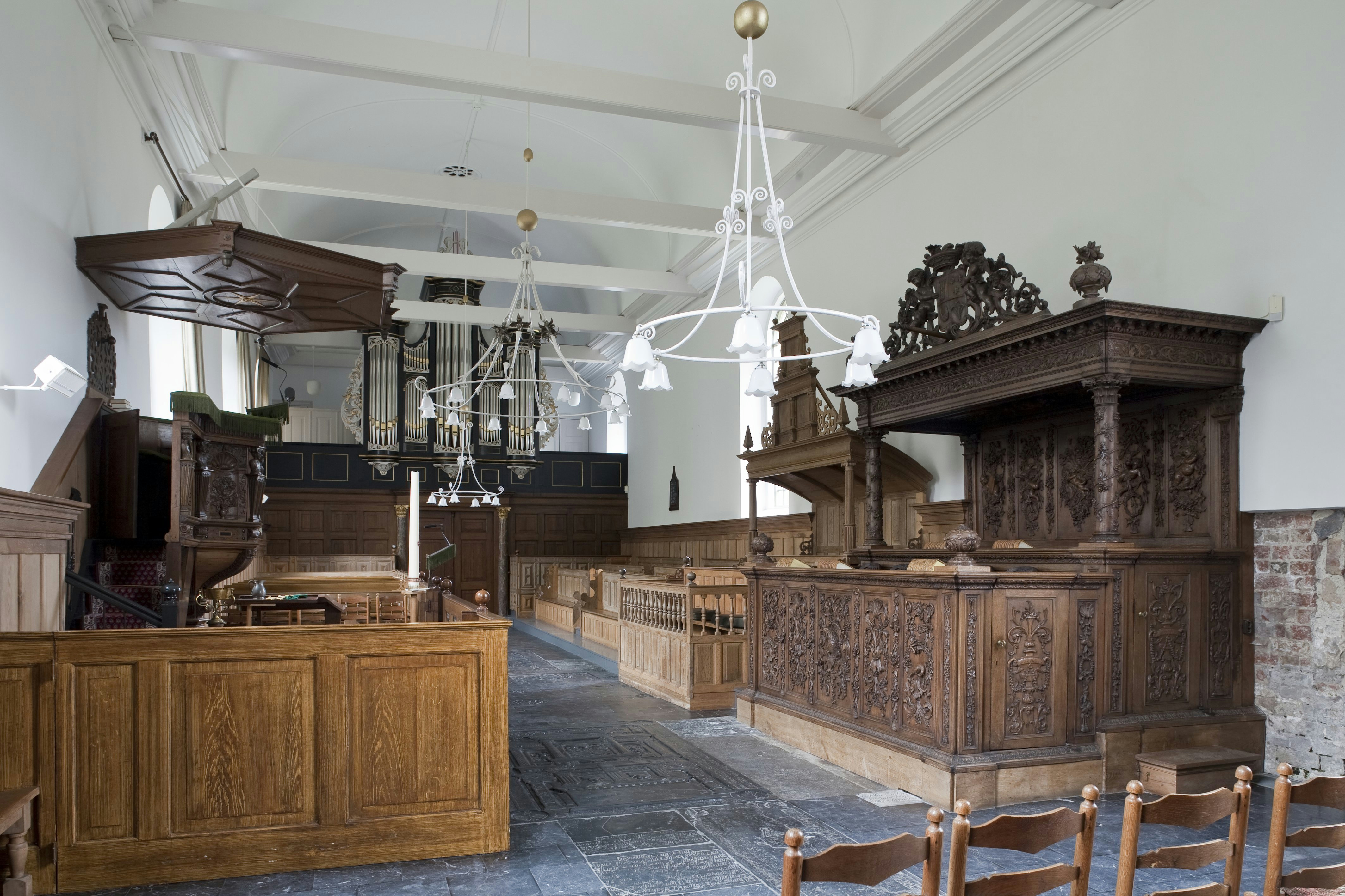 Nederlands Hervormde Kerk: Interieur, overzicht naar het westen